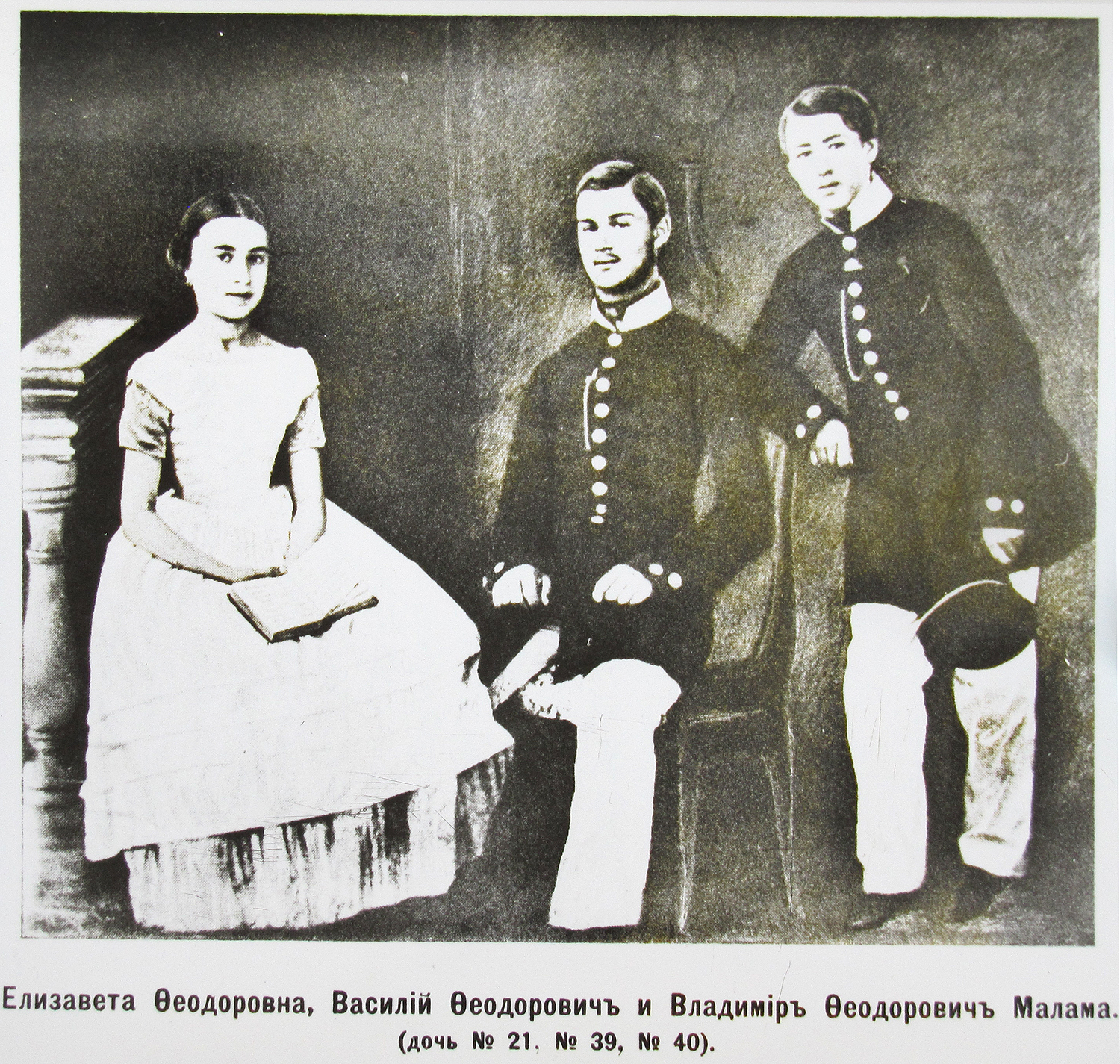 Elizaveta Phedorovna, Vasilij Phedorovich and Vladimir Phedorovichi